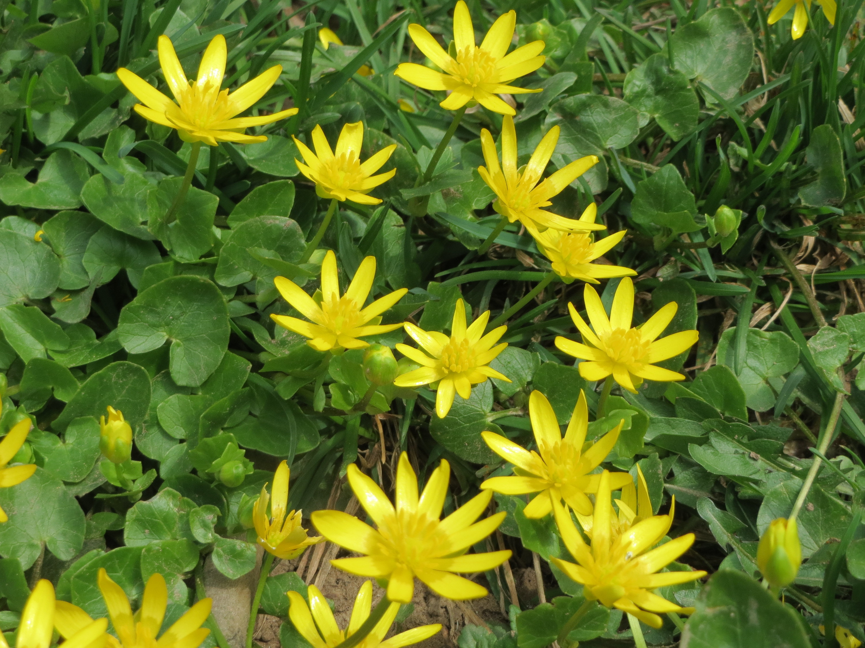 Scharbockskraut (Ficaria verna) an der Saar in Saarbrücken